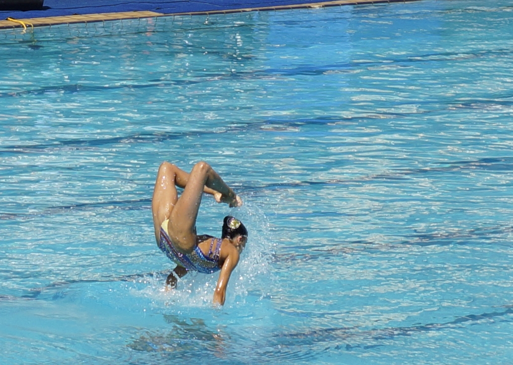 Equipe de nado sincronizado do EUA, Duetos em rotina livre, etapa classificatória realizada em 14 de agosto no Centro Aquático Maria Lenk. Na foto a nadadora Anita Alvarez.